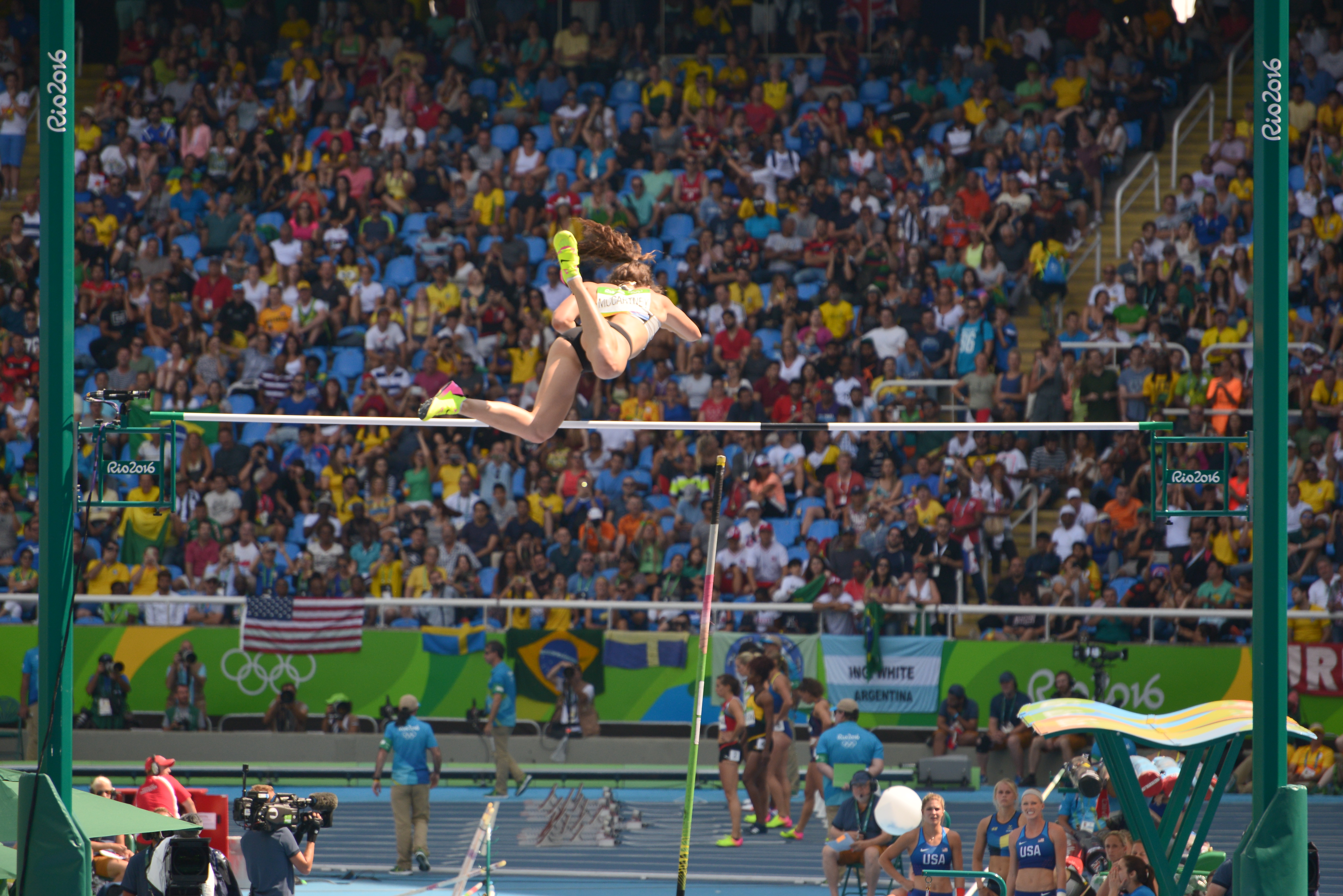 Eliza McCartney en qualification du saut à la perche aux JO de Rio 2016